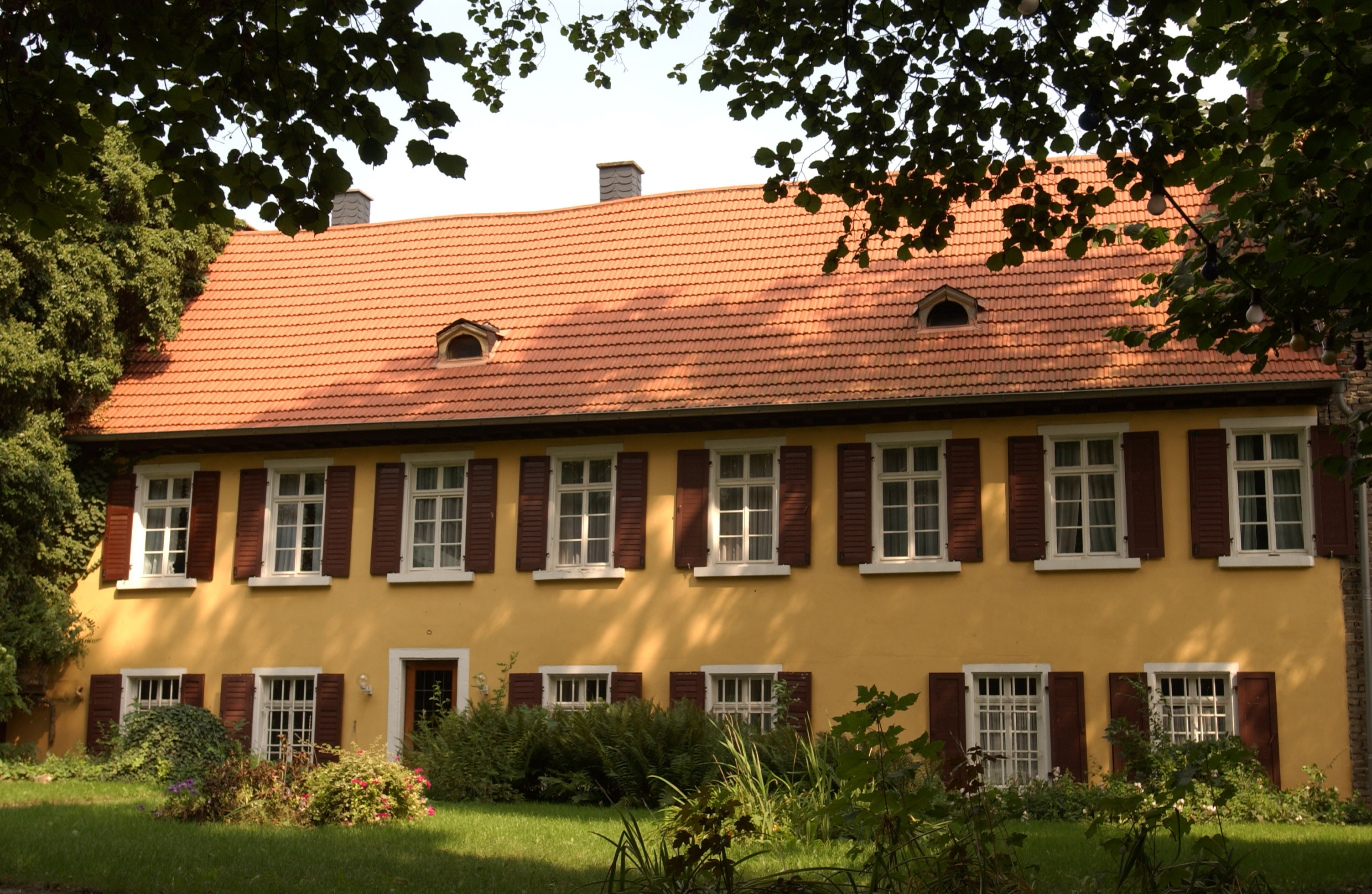 Weingut Steinmühle - Geburtshaus Wendelin Weißheimers - Gartenansicht